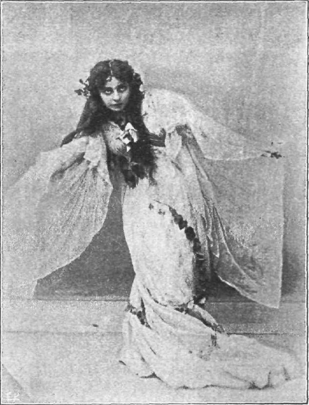 Griechische Schauspielerin, 19. Jahrhundert